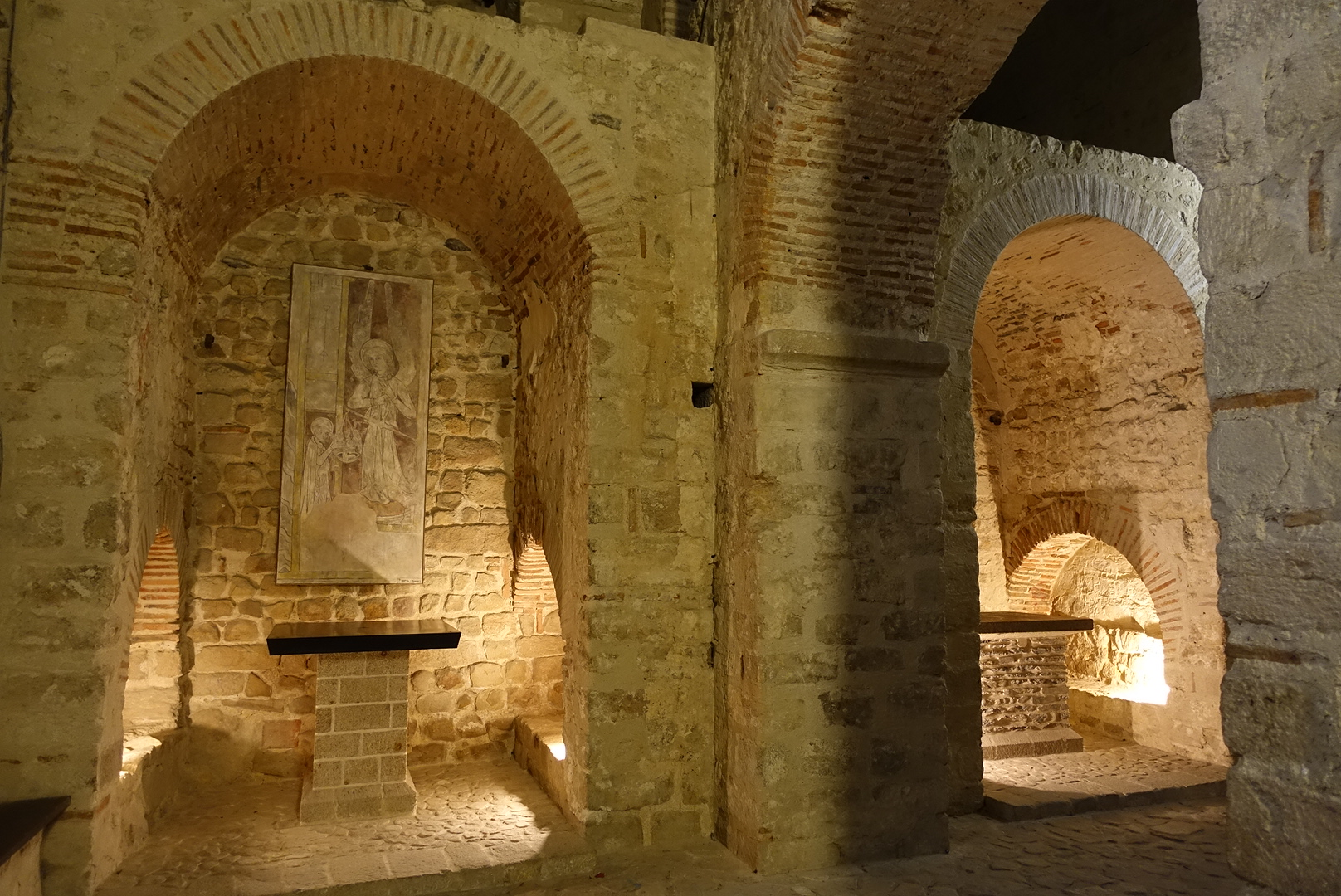 Abbaye du Mont-Saint-Michel : Notre-Dame-sous-Terre.